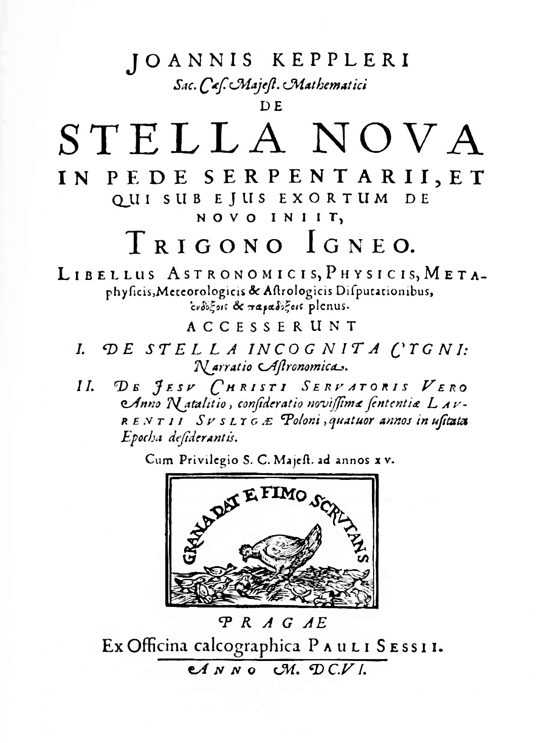 Přední strana knihy "De Stella Nova in Pede Serpentarii" od německého astronoma a teologa Johanna Keplera